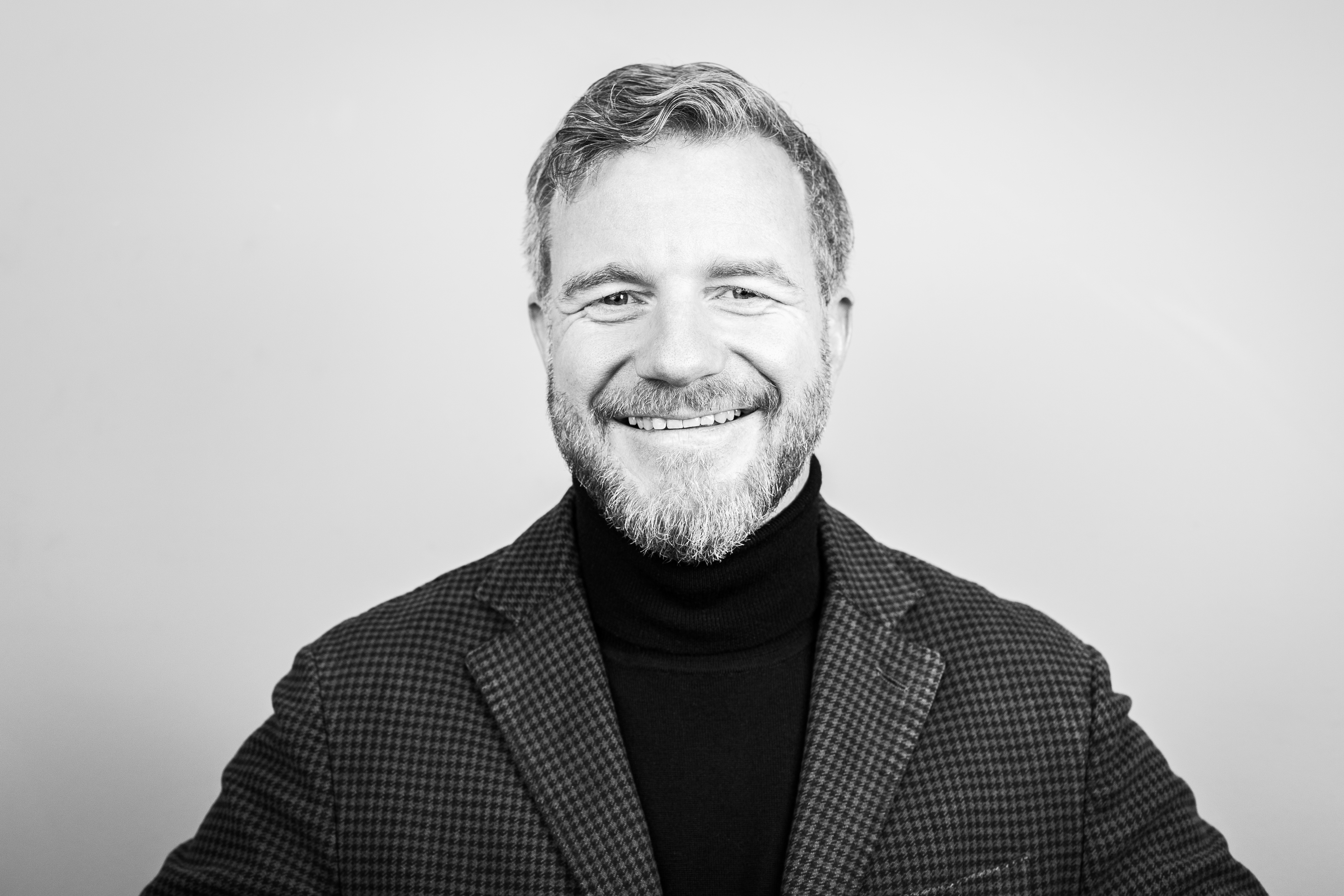 Benjamin Lauterbach, 2019.